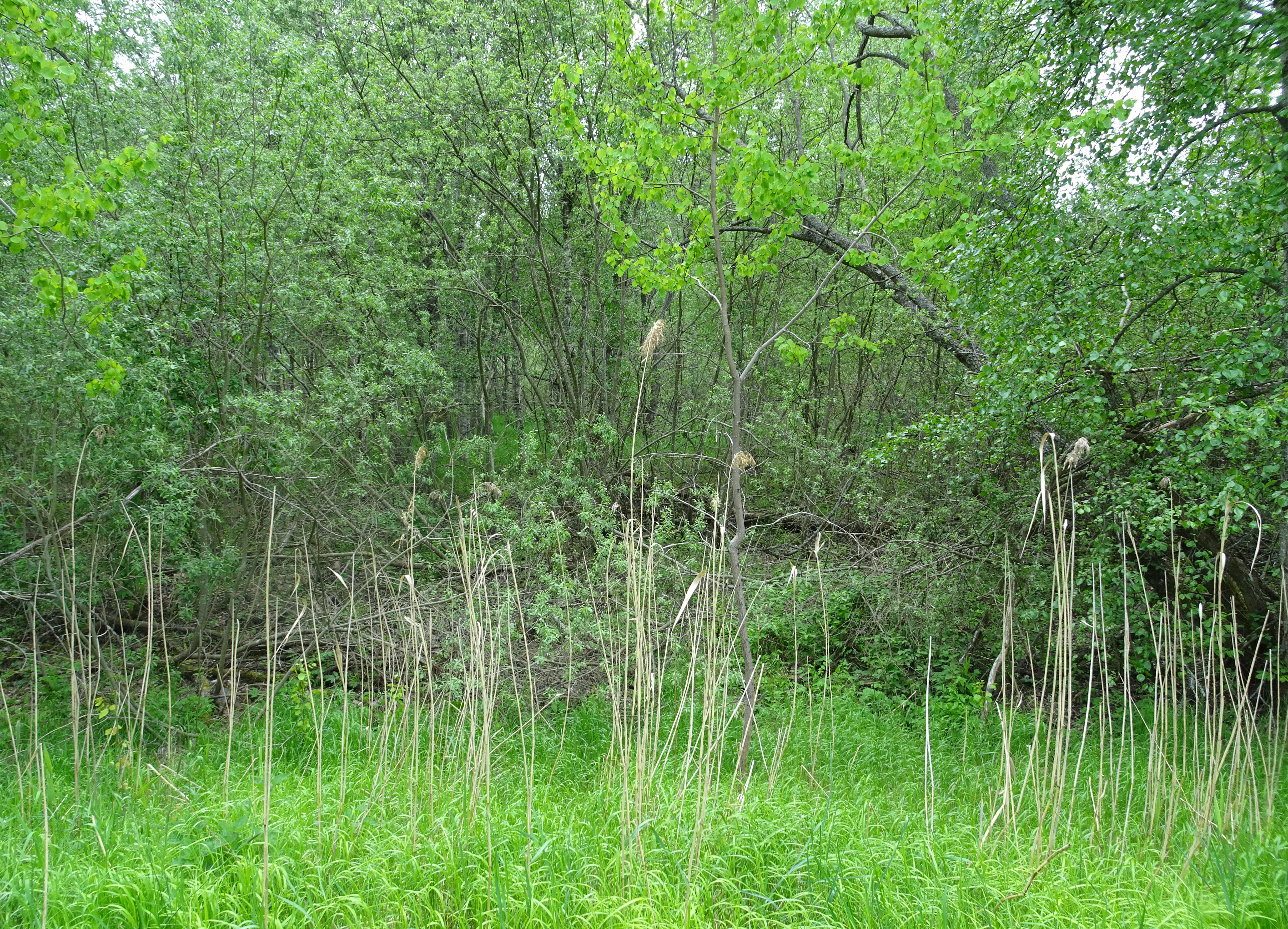 Den nästa helt igenväxta sjön Djupan i Östra Järvafältets naturreservat